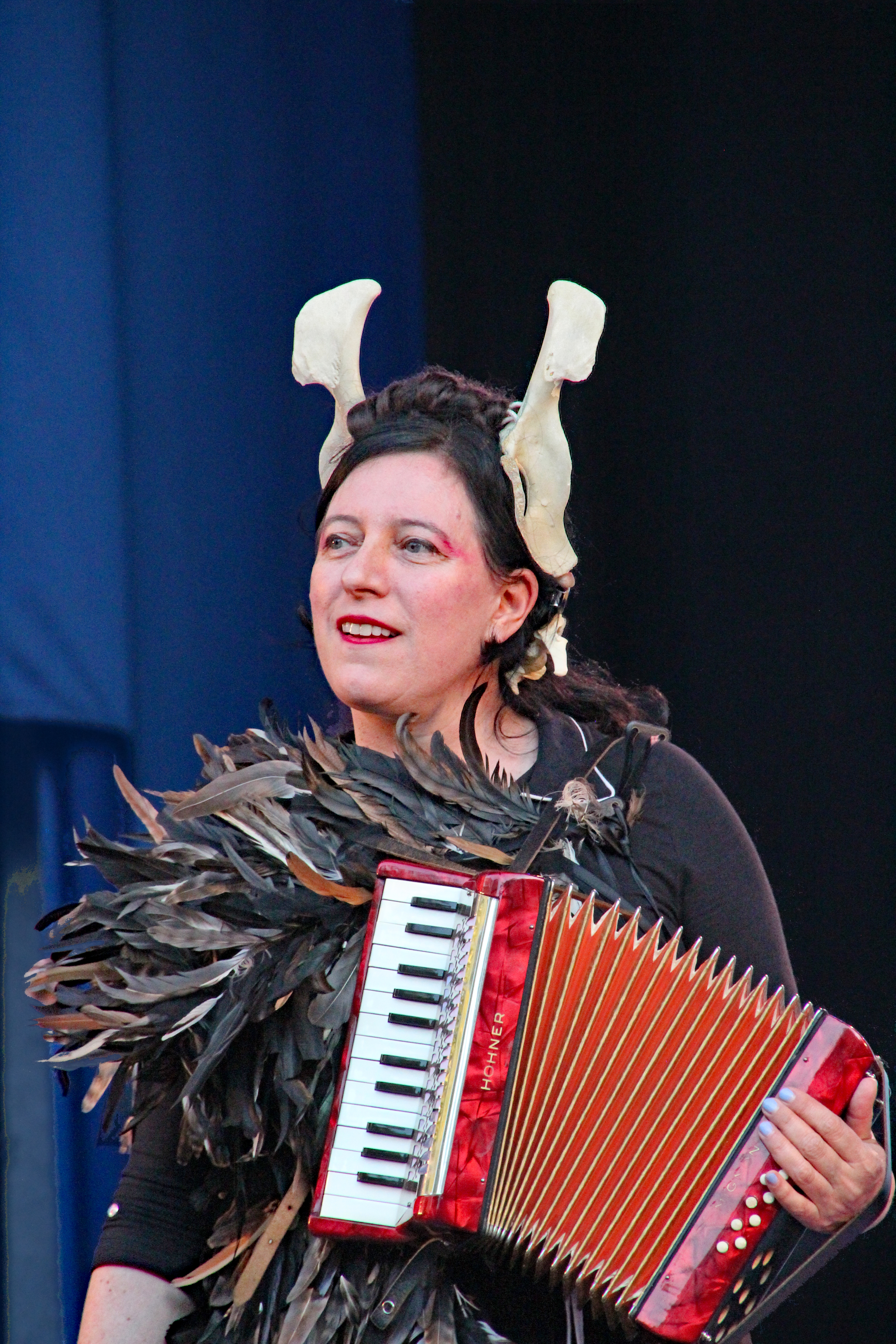 Bildinhalt: Erika Stucky bei einem Auftritt im Frankfurter Palmengarten Aufnahmeort: Frankfurt am Main, Deutschland Die dargestellte Person wurde bei einem öffentlichen Auftritt fotografiert.